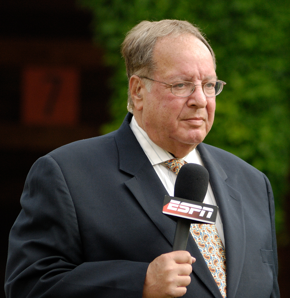 ESPN broadcaster Hank Goldberg.